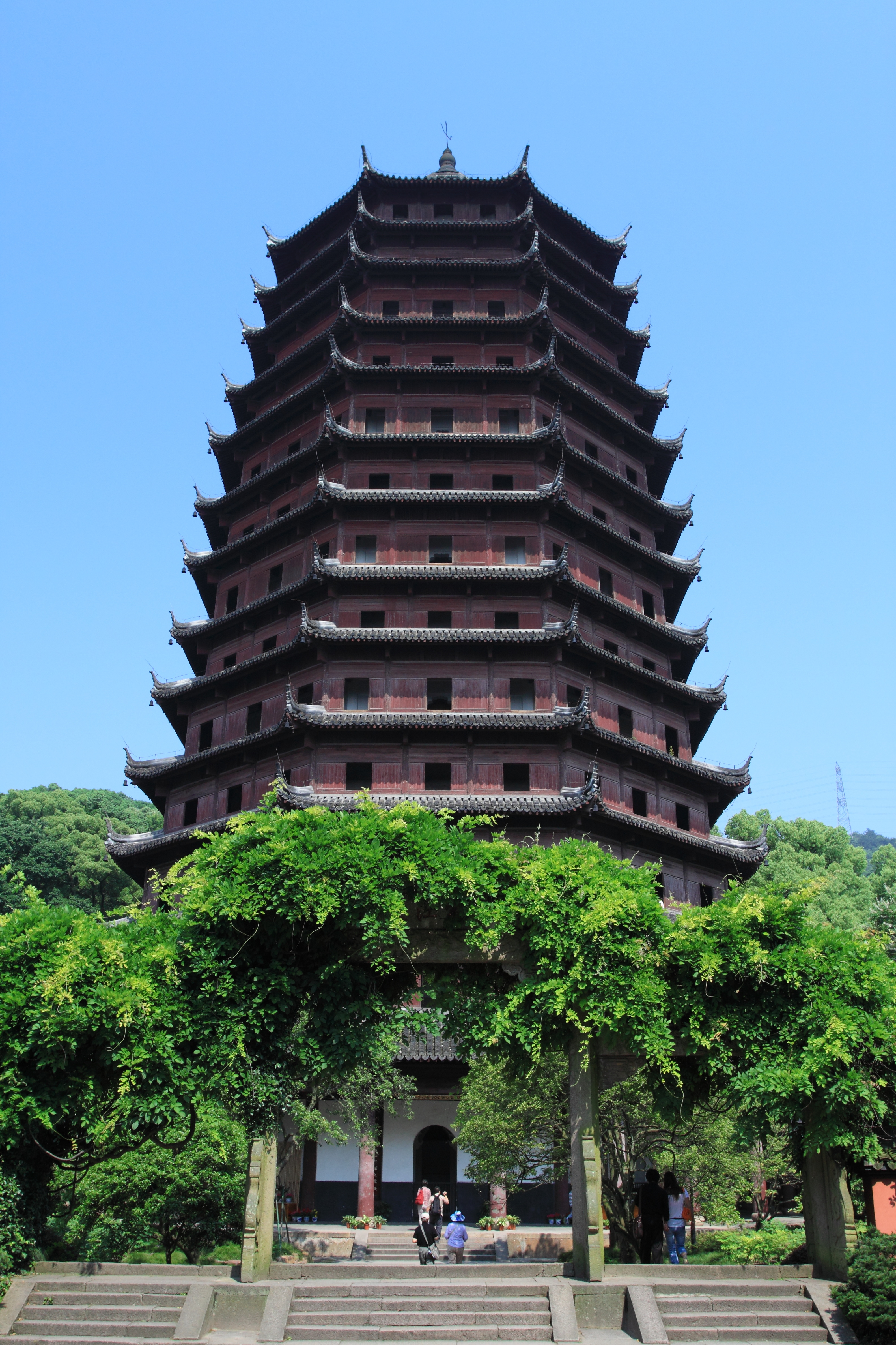 六和塔，位于中国浙江省杭州市。